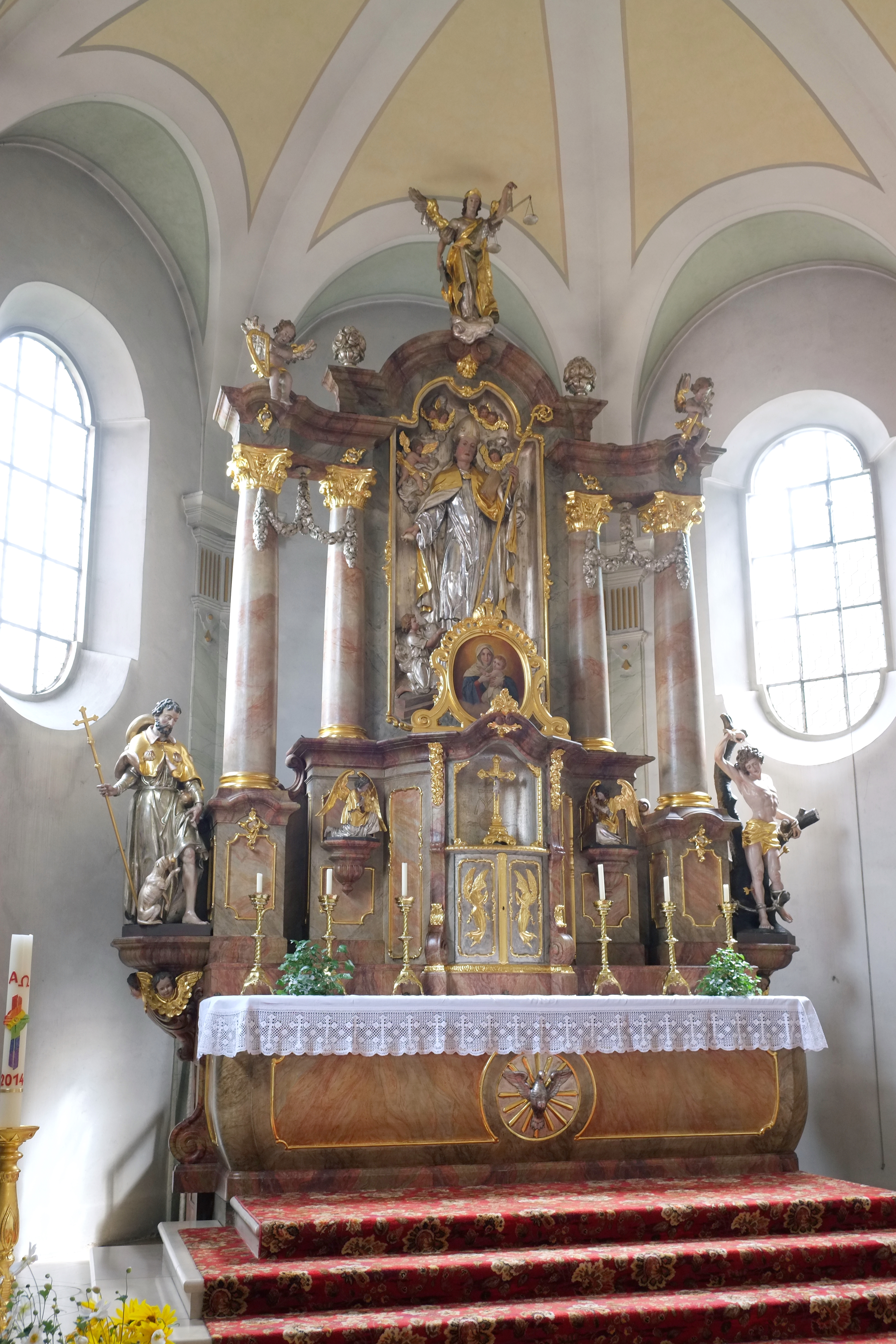 Katholische Pfarrkirche St. Nikolaus in Eppisburg, einem Ortsteil von Holzheim (bei Dillingen an der Donau) im Landkreis Dillingen an der Donau (Bayern, Deutschland)